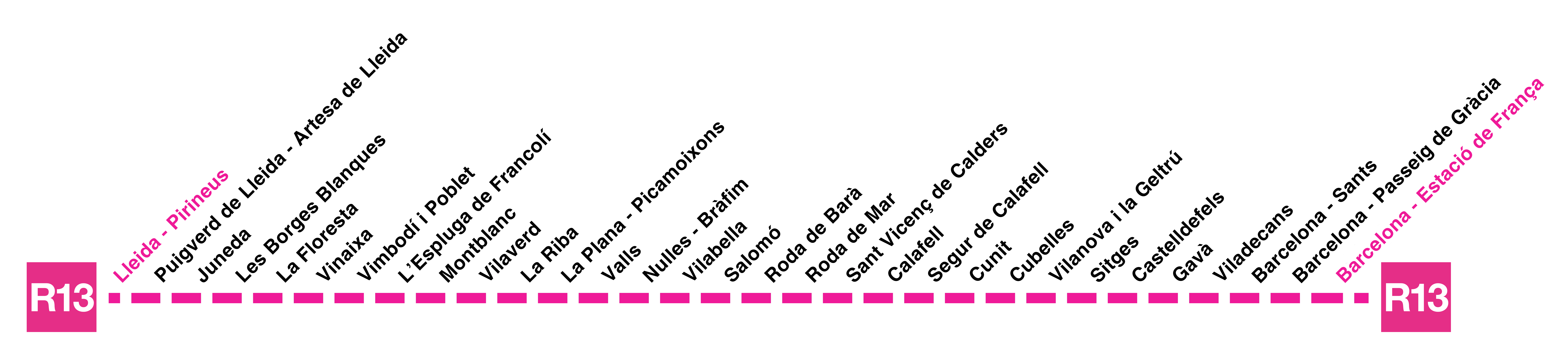 Mapa de la línea R13 de Rodalies de Catalunya